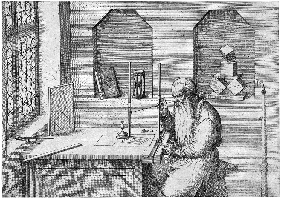 Wenzel Jamnitzer, Goldschmied und Mathematiker, an seinem Zeichentisch. Radierung. 16,8 x 23,7 cm. Andresen 6, Becker 122, Seelig (New Hollstein, German) 137.